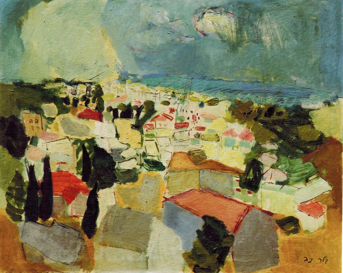 נוף רמת גן מגבעת ההחלמה